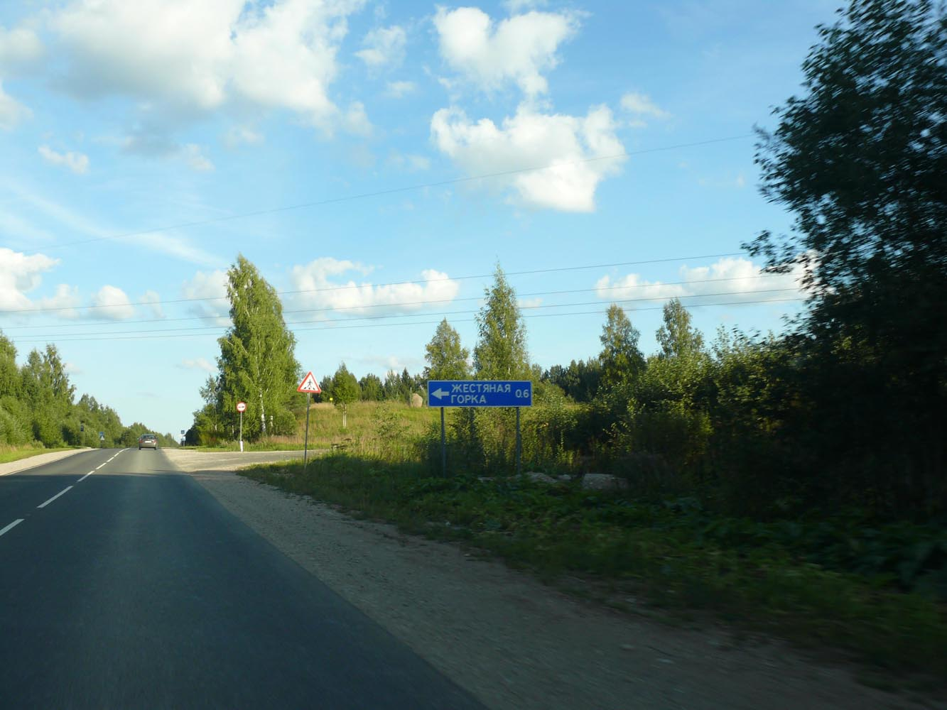 Указатель на деревню Жестяная Горка. Батецкий район Новгородской области